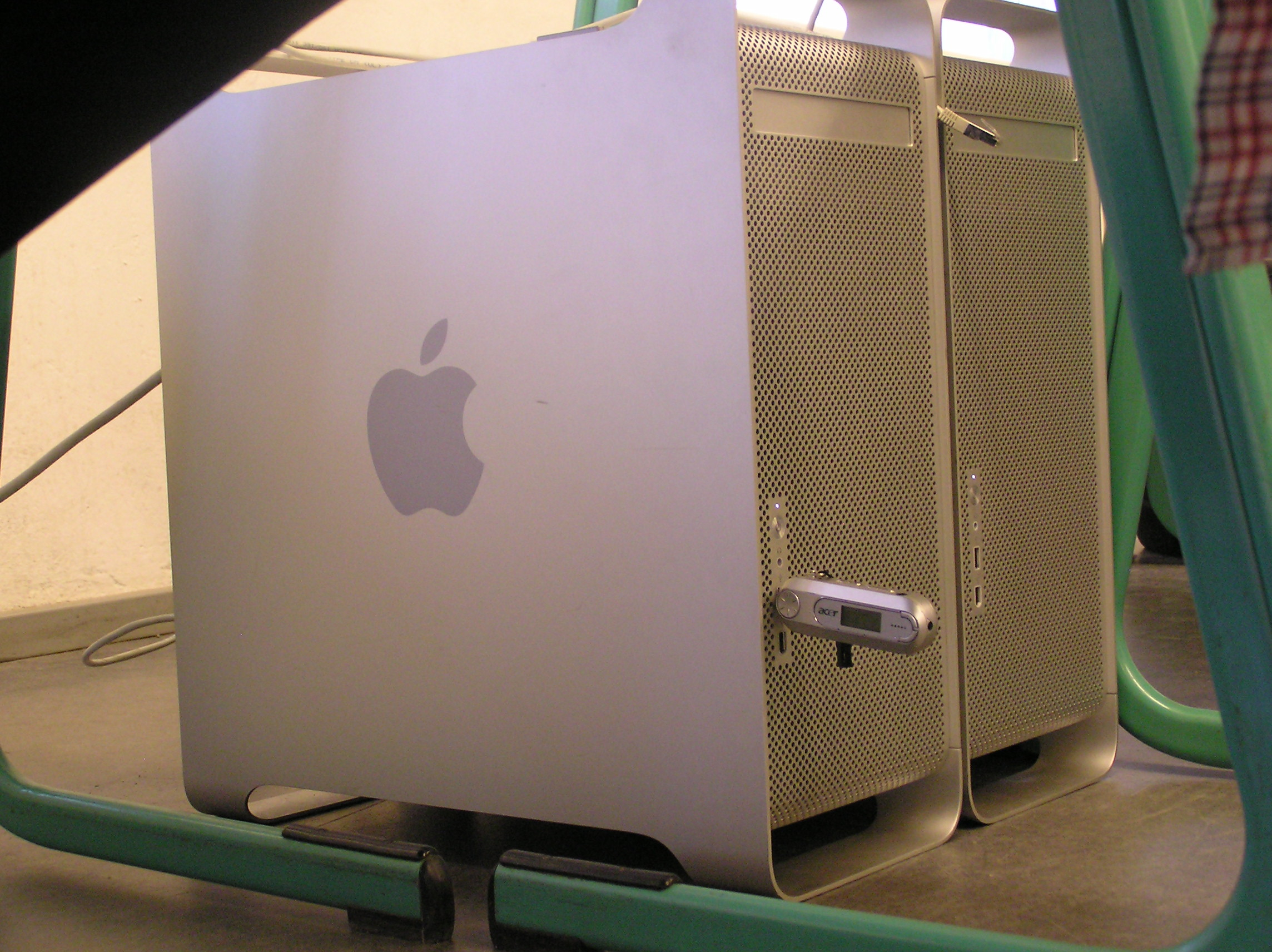 Apple G5s at the Lange Nacht der Wissenschaften 2006, HTW-Dresden